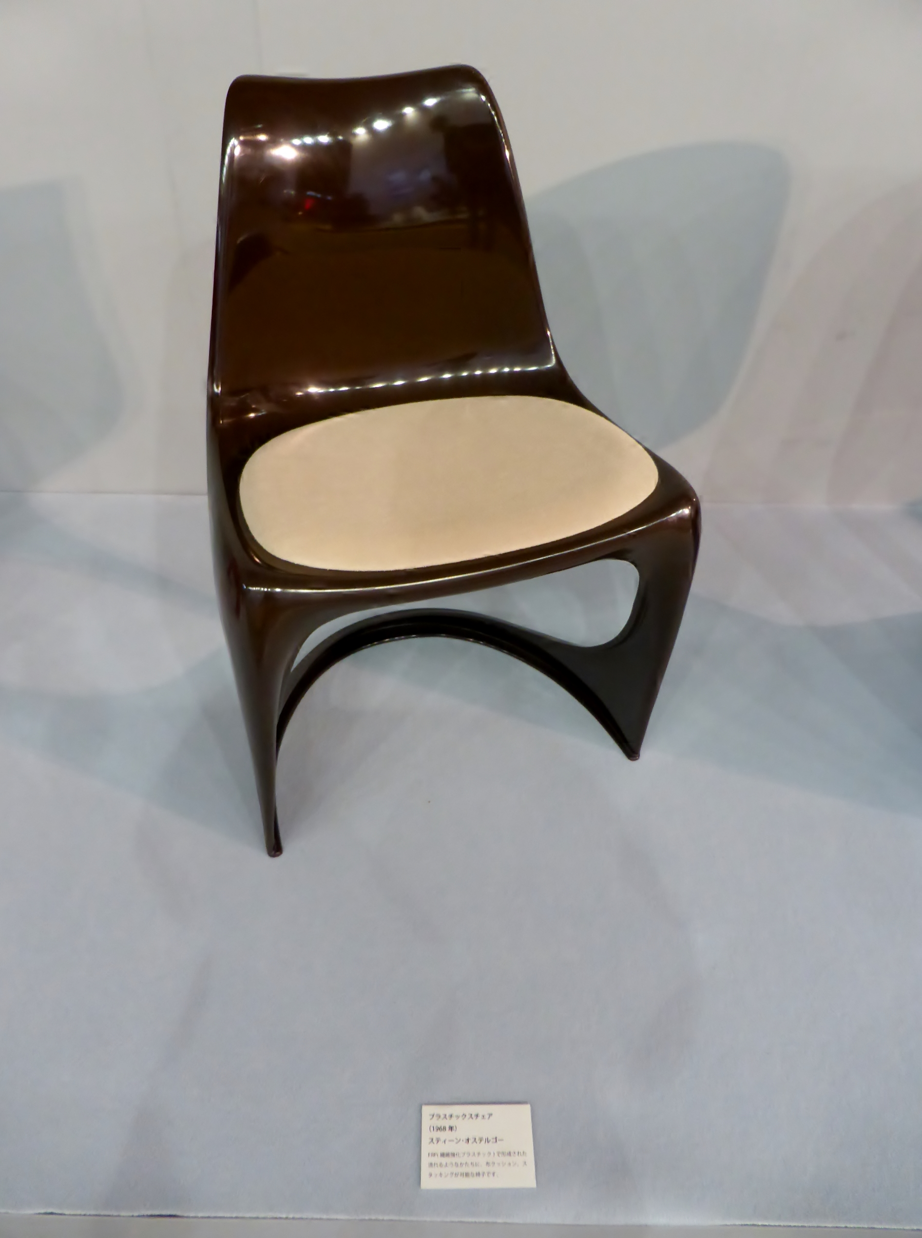 プラスチックスチェアを撮影。